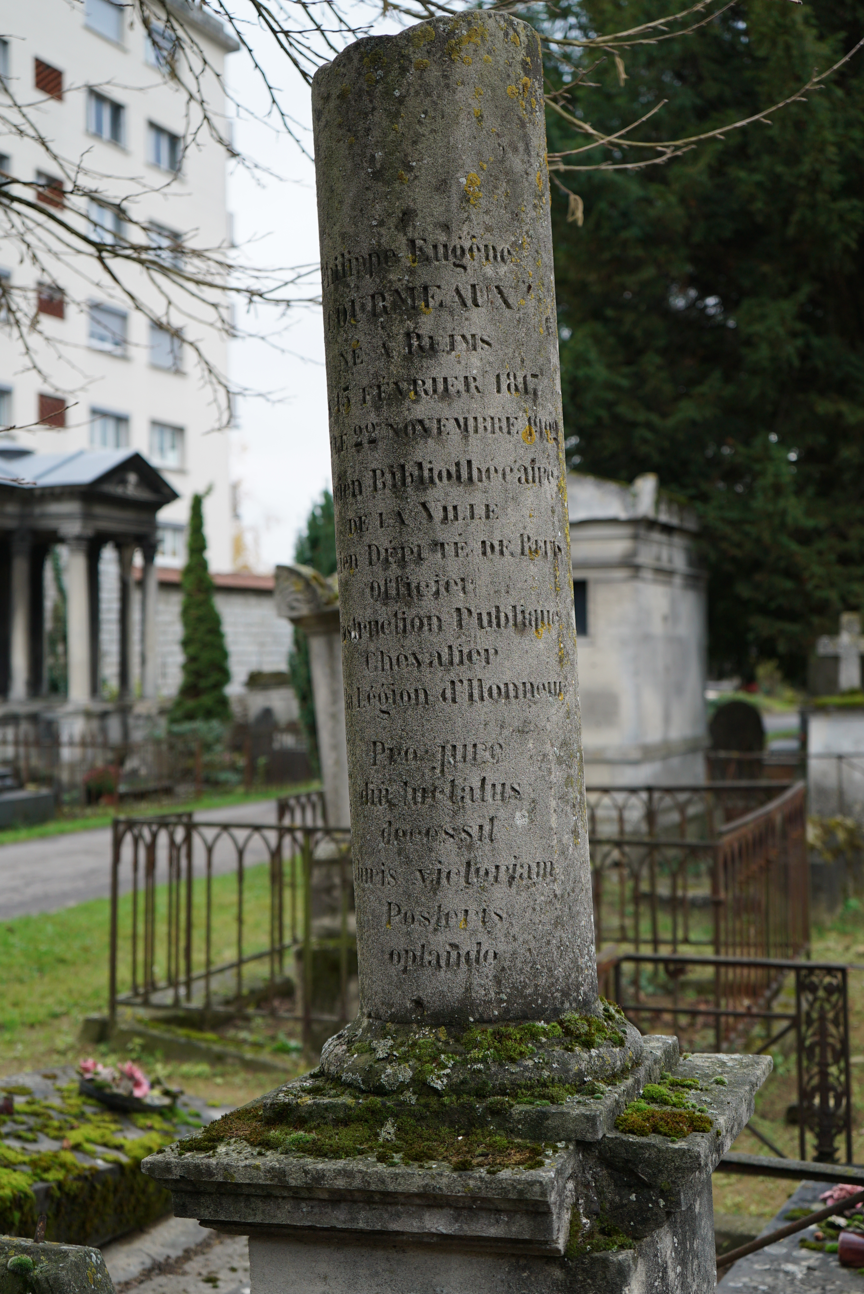 concession de la famille courmeau, canton 8.